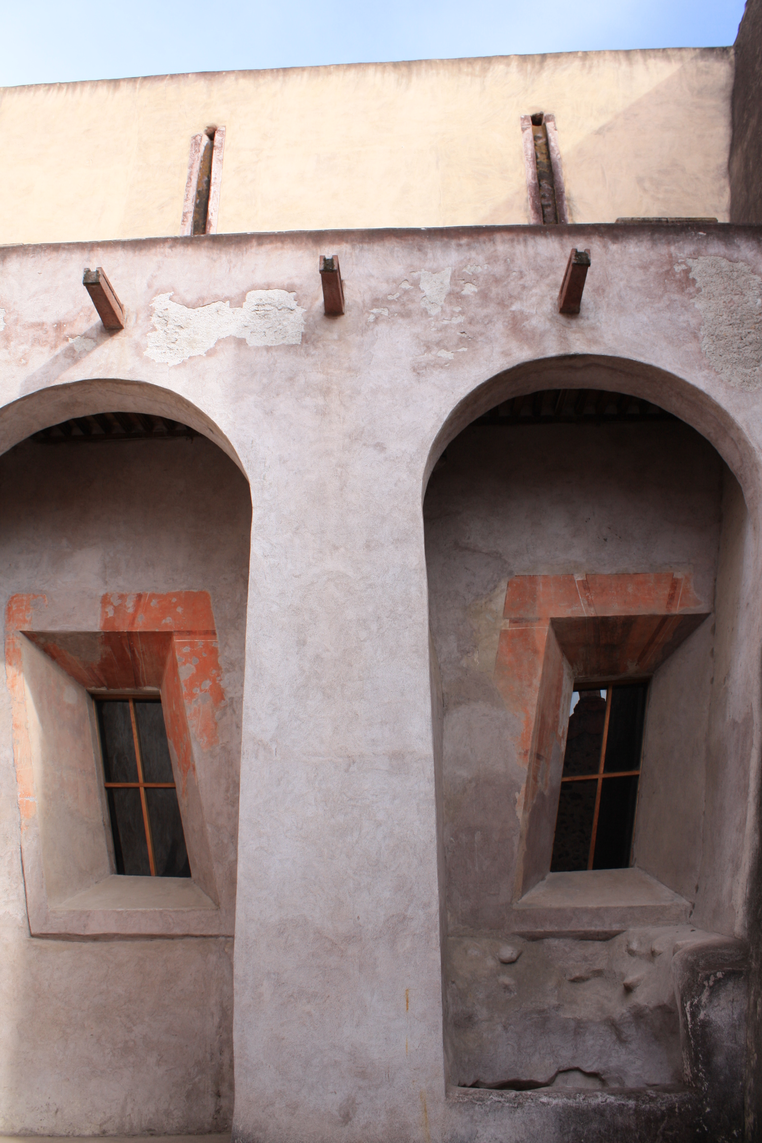 Convento de Actopan